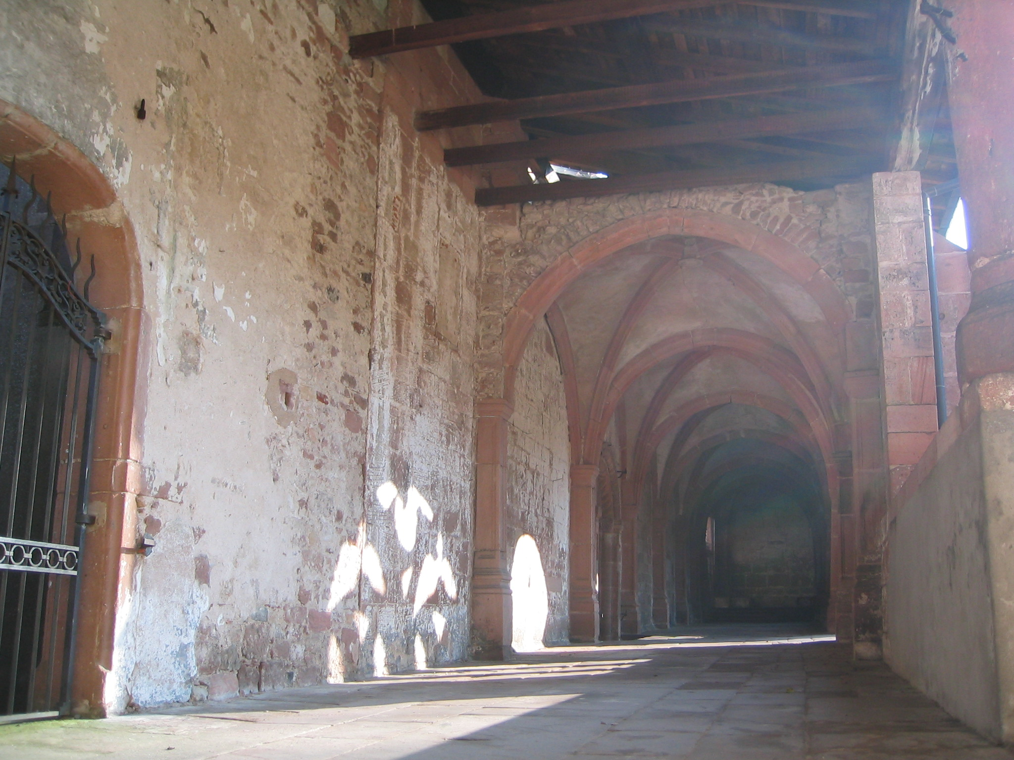 Saint-Dié-des-Vosges, het klooster.